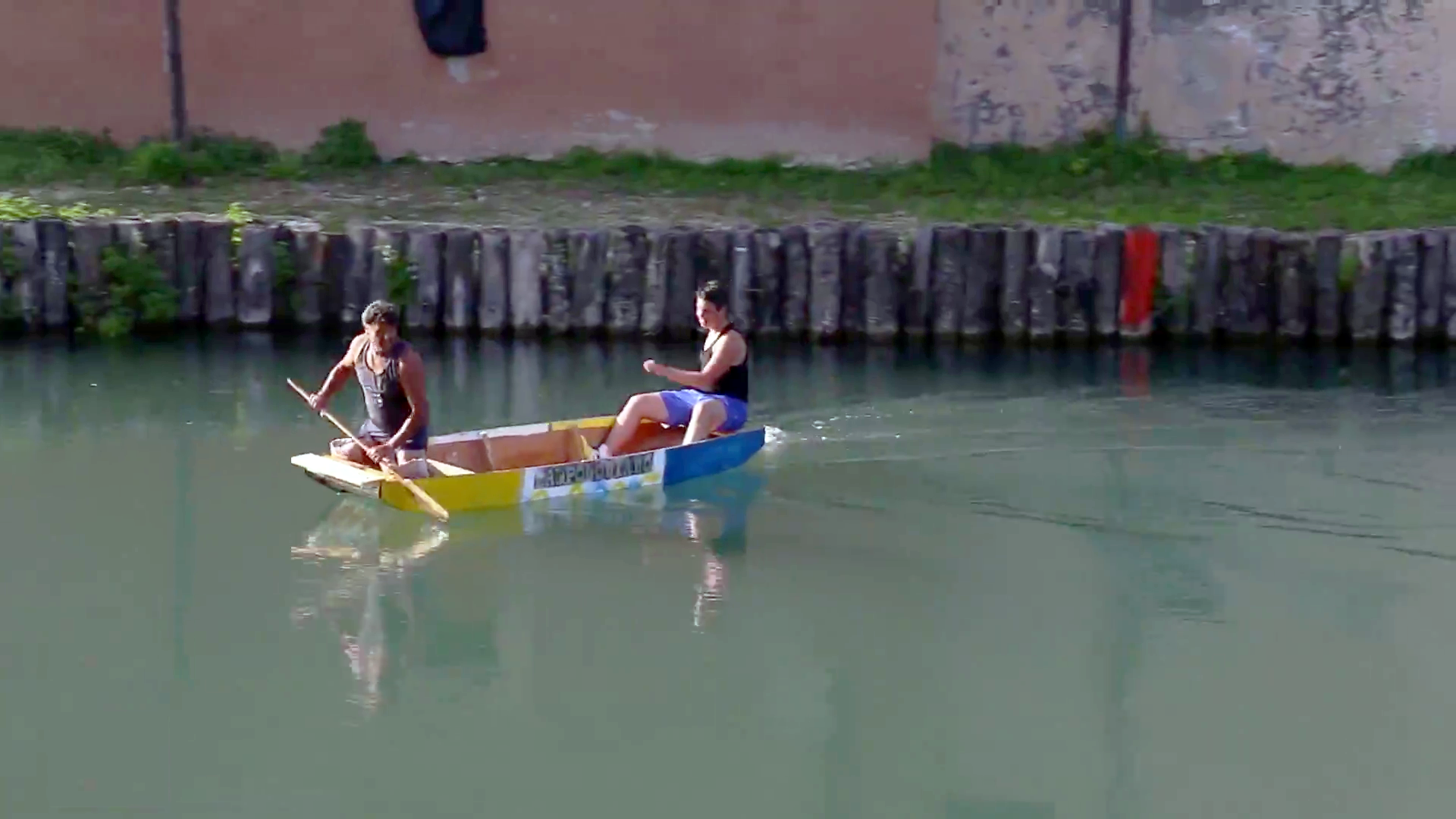 Alcuni partecipanti si allenano nelle acque del fiume Velino in vista della Festa del Sole, competizione tradizionale di Rieti (Lazio)